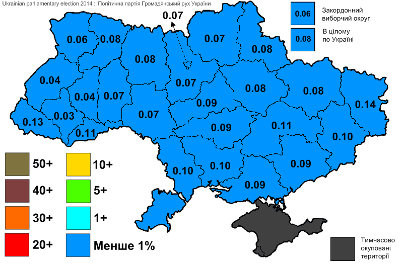 Результати виборів до Верховної Ради України, які відбулись 25 жовтня 2014 року. Інформація з офіційного сайту ЦВК. Політична партія Громадянський рух України.